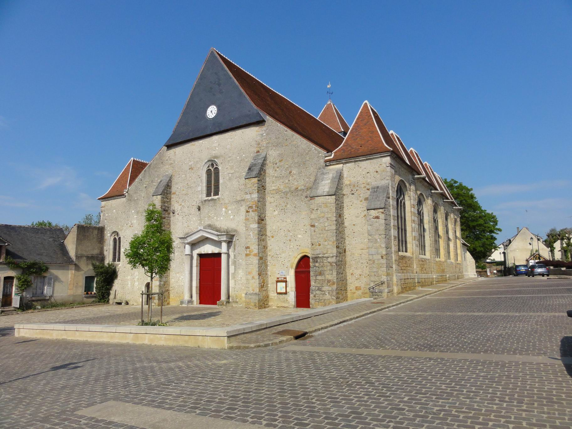 époque de construction 1ère moitié 12e siècle ; 16e siècle GPS : 48.042275, 3.062161 .